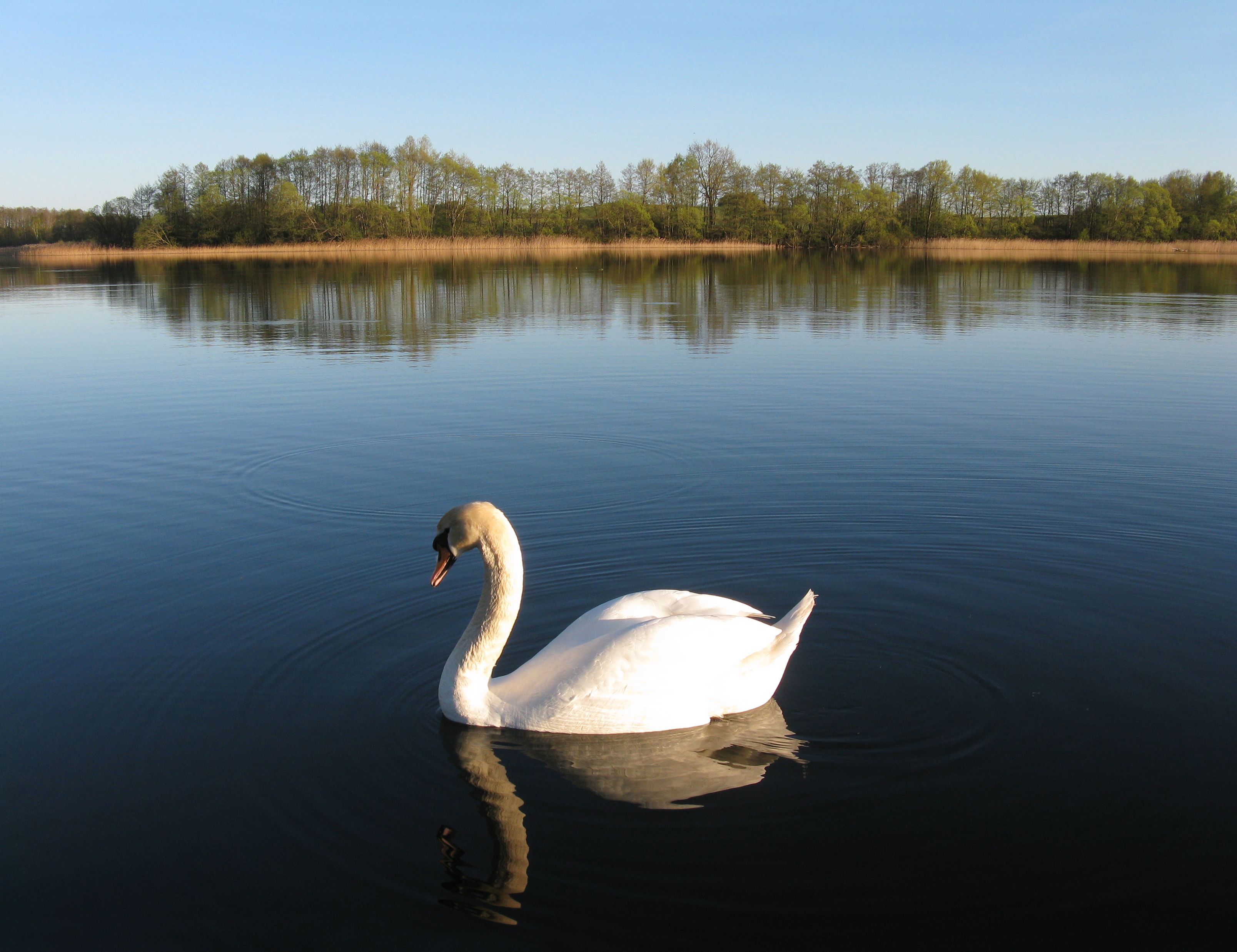 Jezioro Okra w Drawsku Pomorskim - łabędź niemy.